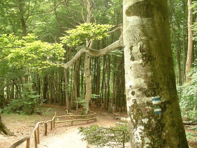 Rotbuchen im Nationalpark Jasmund auf Rügen.